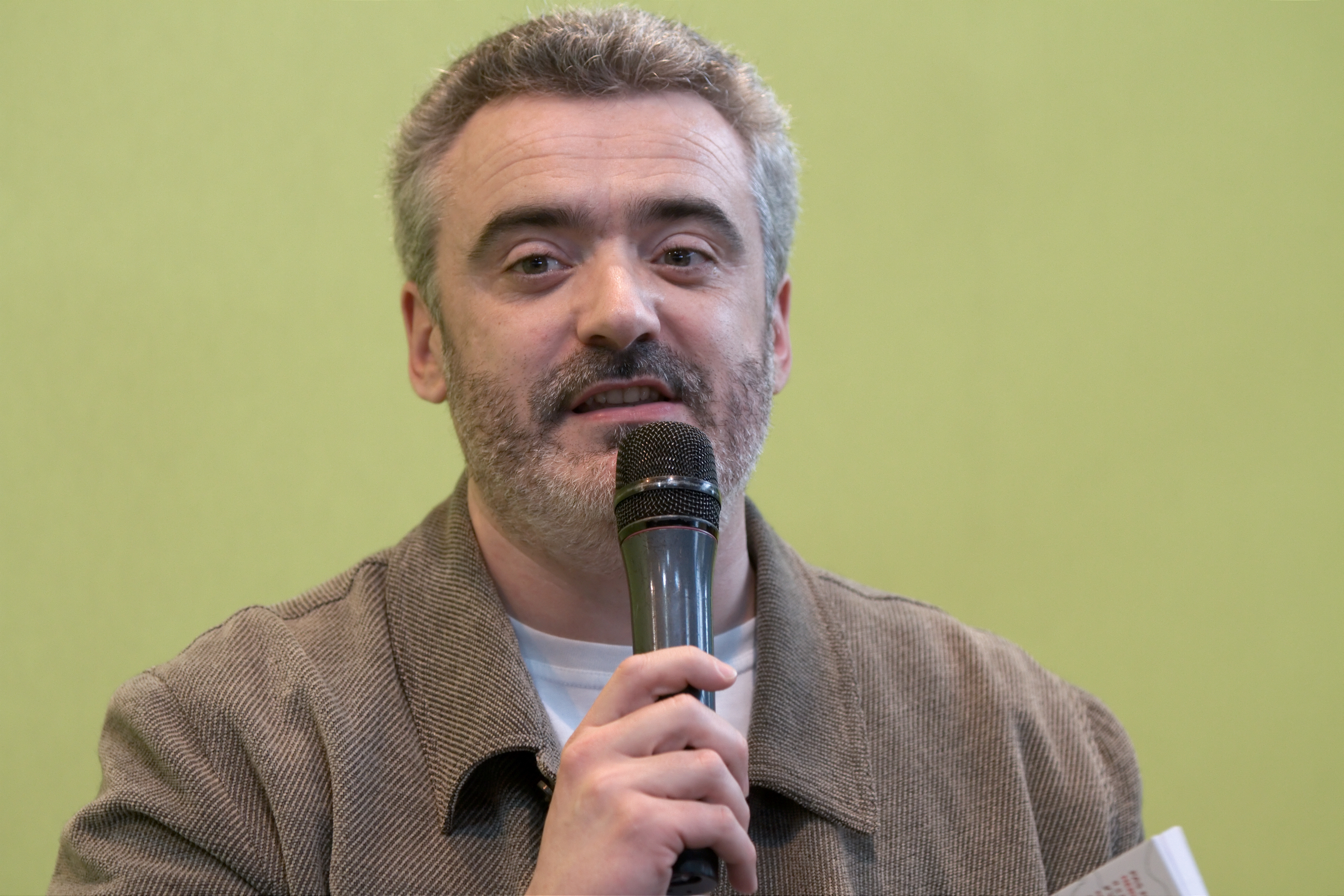 Mikaël Ollivier au Salon du livre de Paris pour une séance de lecture au Club Jeunesse.